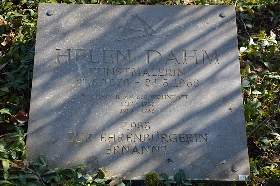 Ehrengrab von Helen Dahm in Oetwil am See ZH